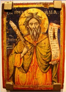 "Св. Илија, 1898 г. Автор: зограф Јосиф Радевич" Изработена е од дрво и темпера. Заднината на иконата е темносина. Пророкот Илија има отворен свиток во левата рака и сатар во десната. Ореолот и наметката се претставени со златна боја. Легендата е словенска.